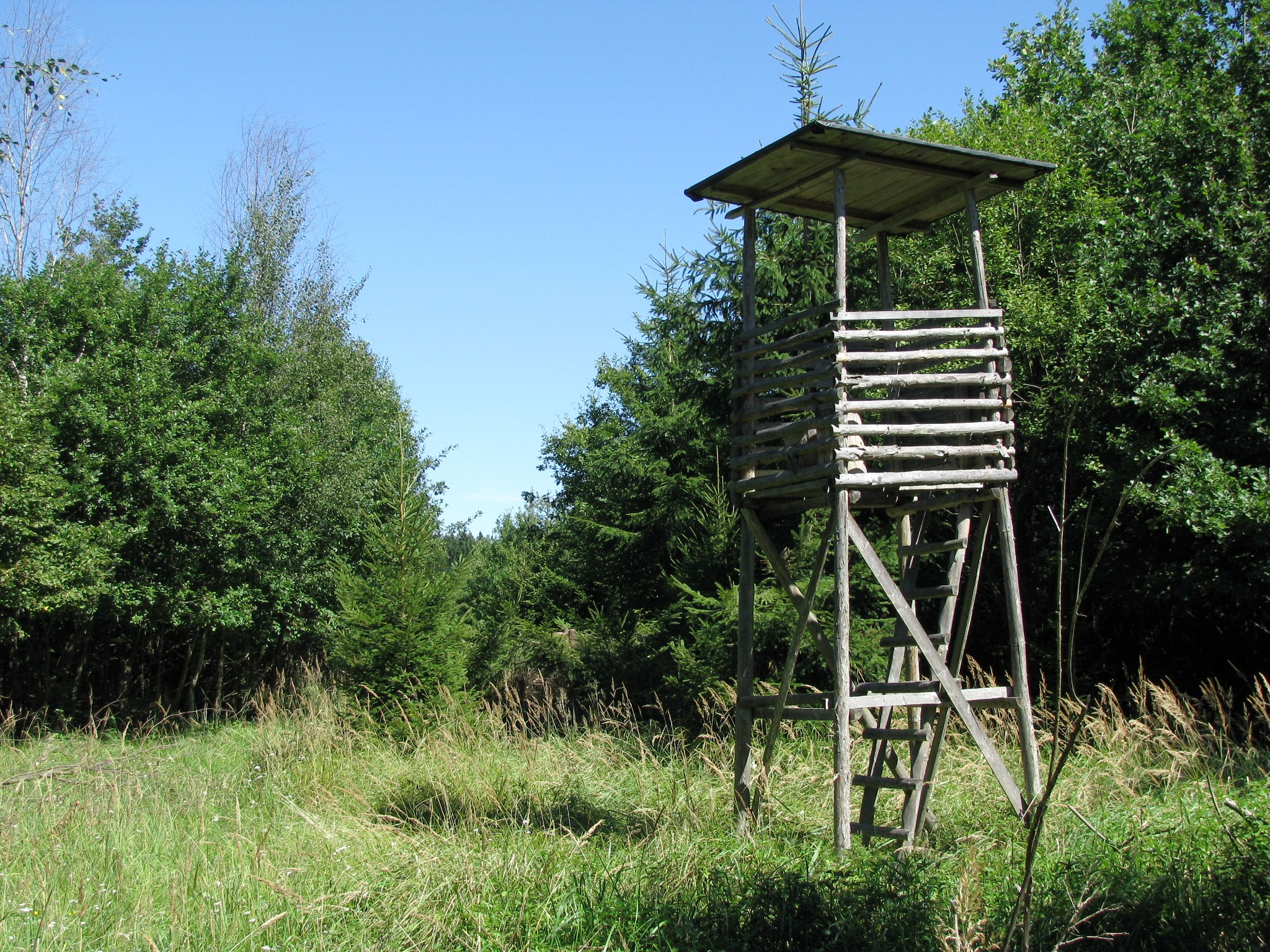 Hochsitz nähe Preysing- und Karolinengeräumt im Forstenrieder Park